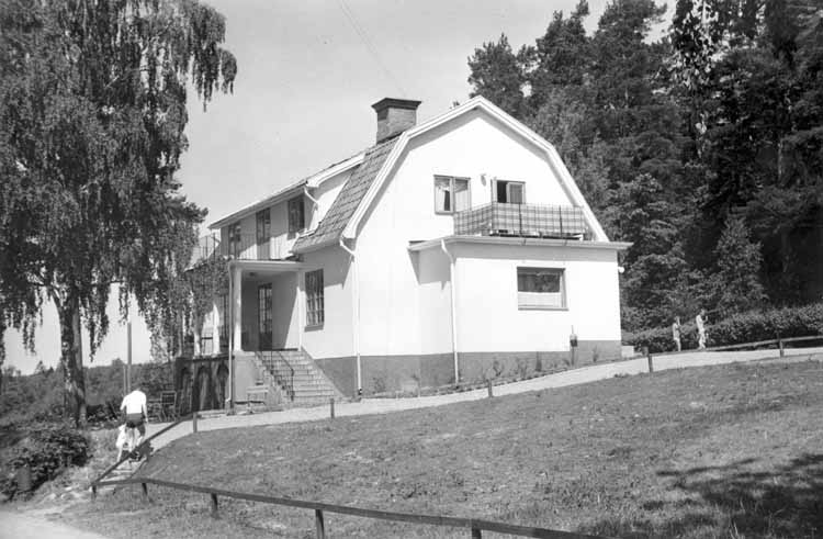 Ängsjö gård i Järfälla kommun. Huvudbyggnaden. Används som friluftsanläggning. Bildnr 05061.